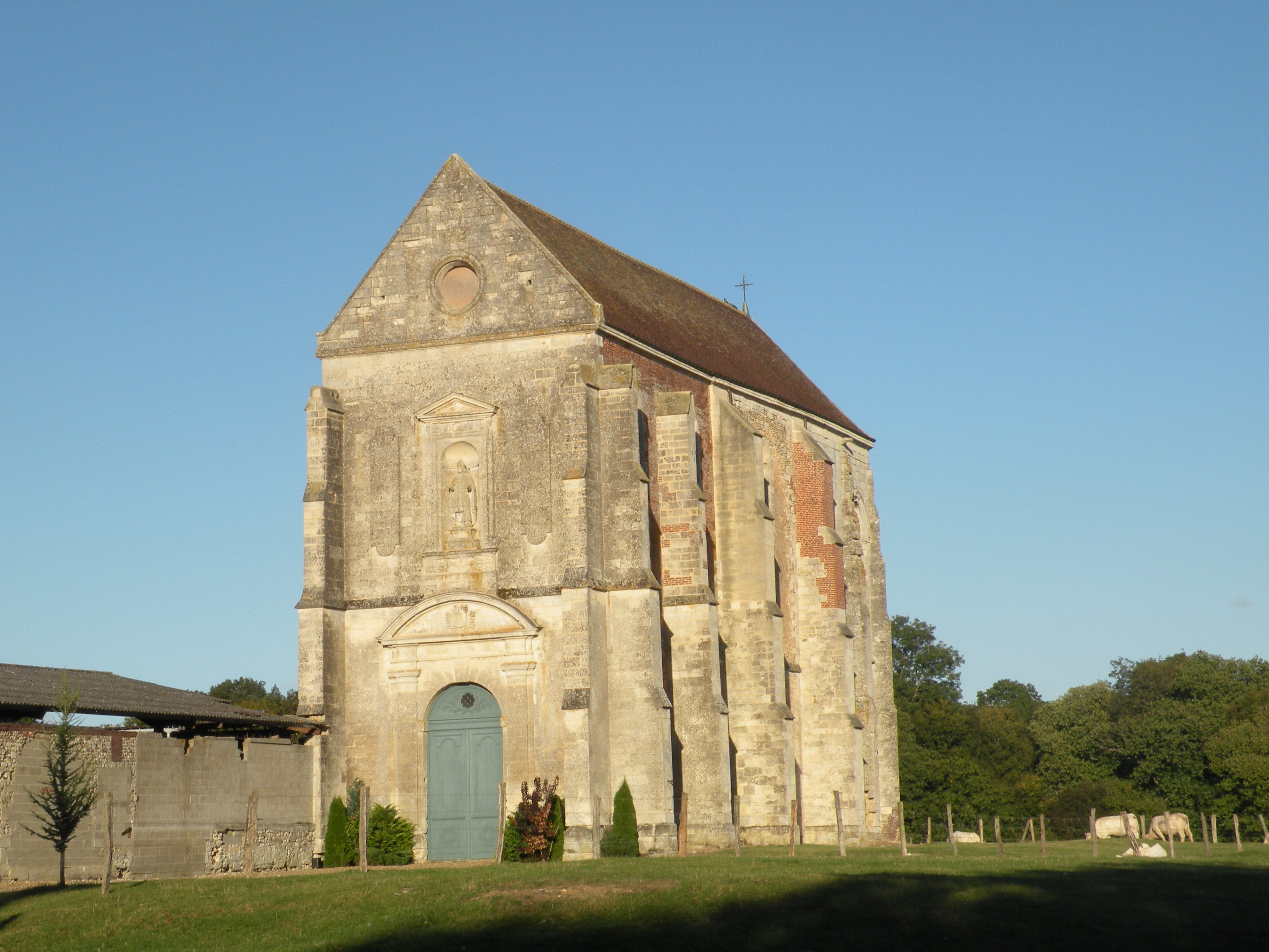 abbaye Saint-Nicolas de Marcheroux